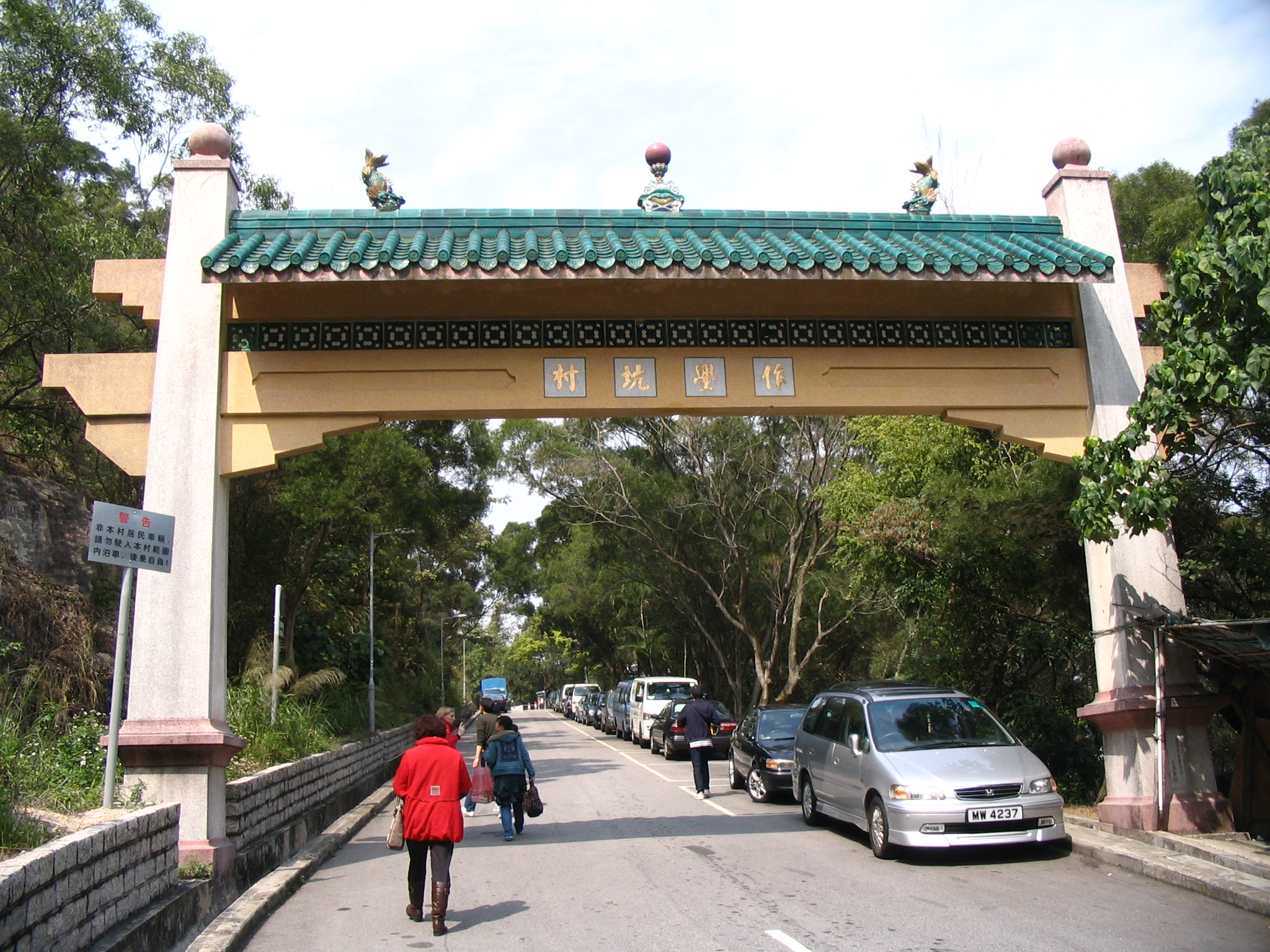 Tsok Pok Hang Village